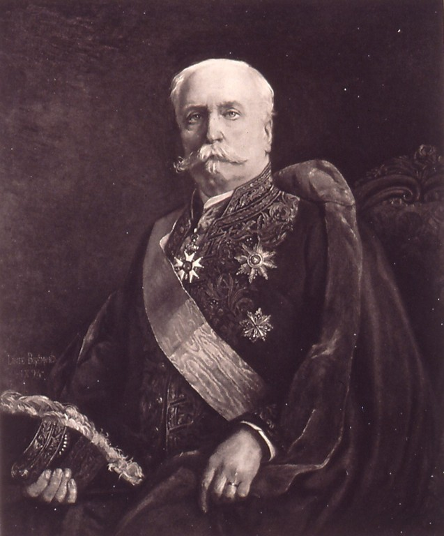 Le Comte de Reiset, ministre plénipotentiaire de France